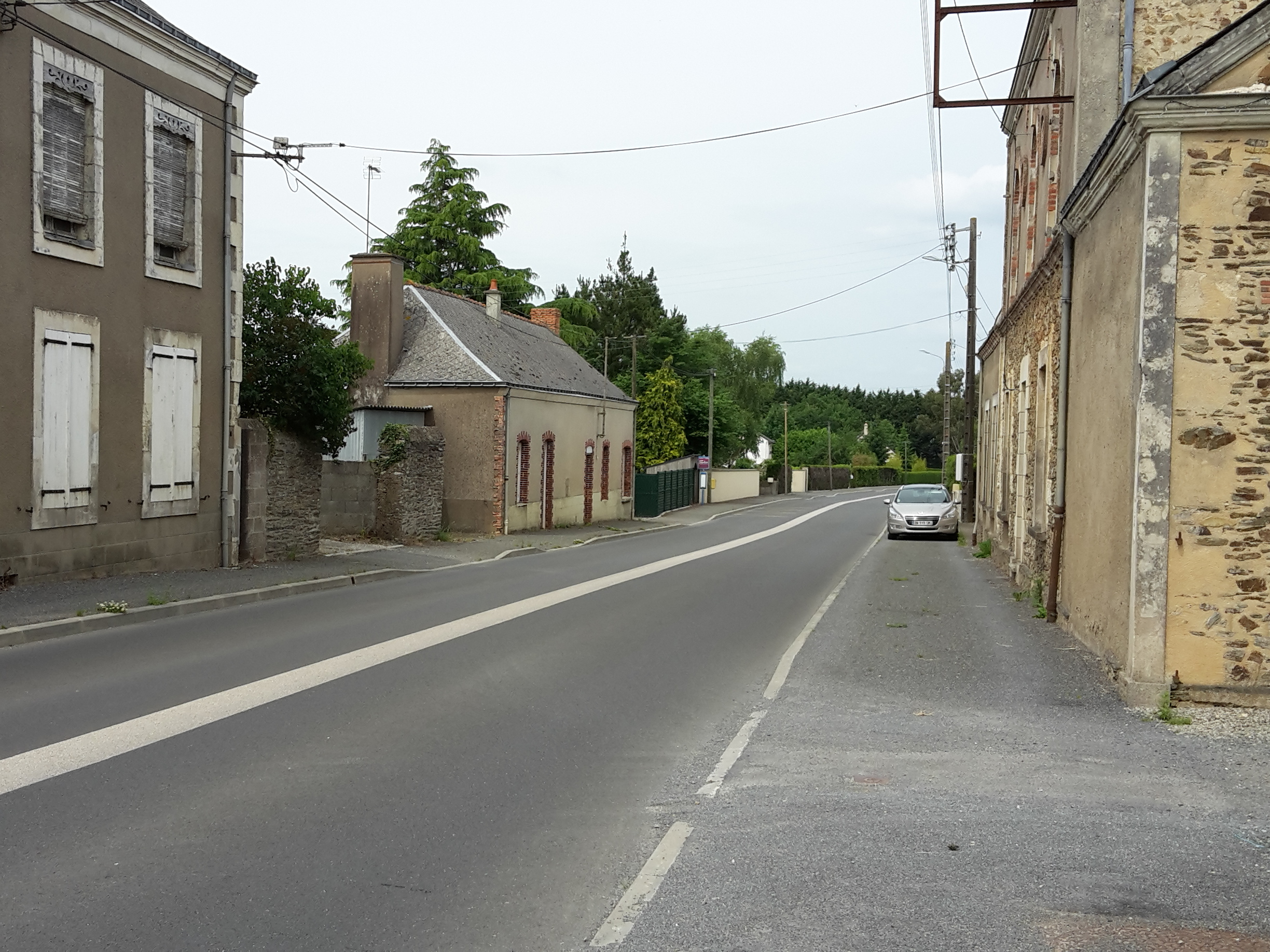 La Roche d'Iré, Loiré, Maine-et-Loire, France.